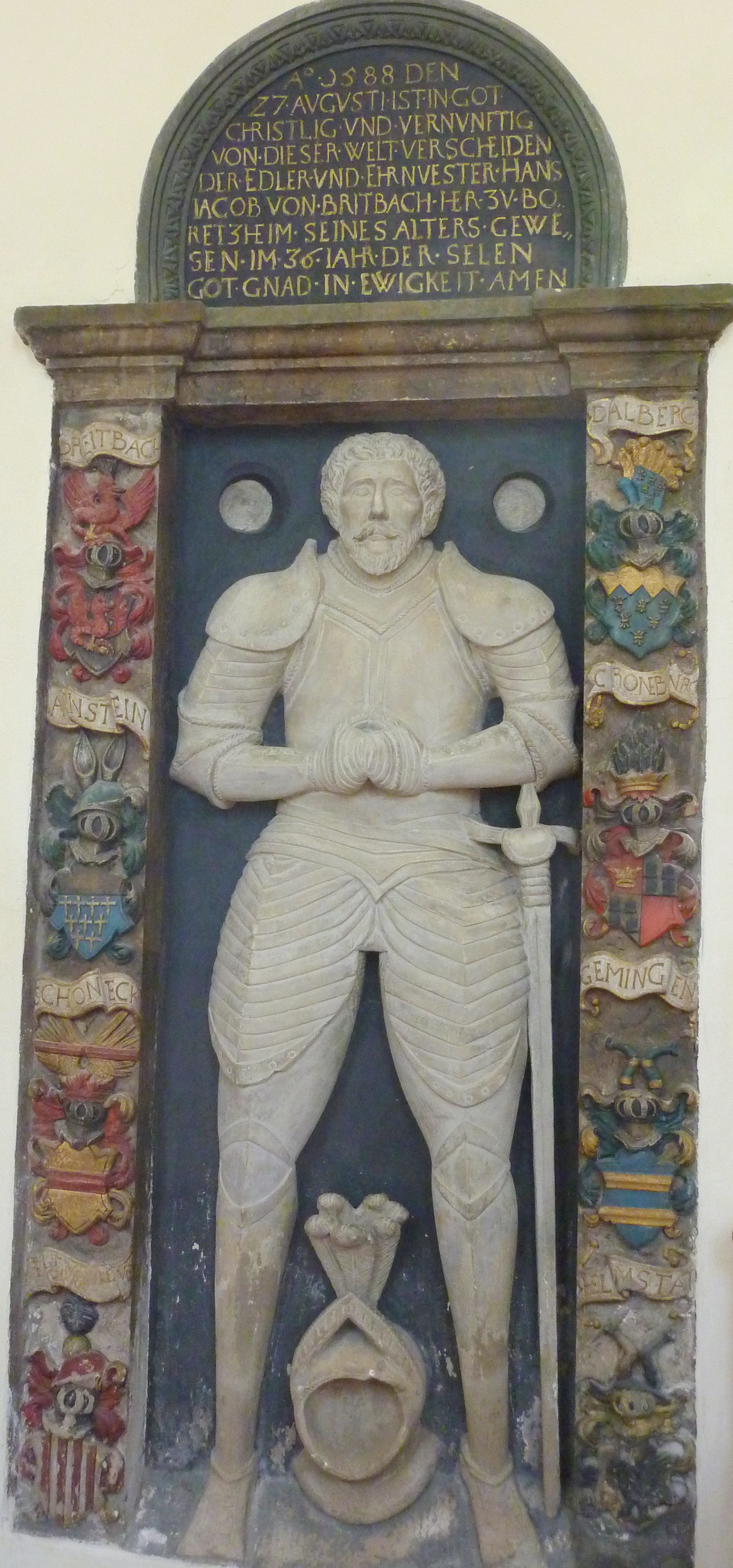 Grabplatte in der katholischen Pfarrkirche St. Johannes Baptist in Sankt Johann von Hans Jakob von Breidbach (gest. 27. August 1588)